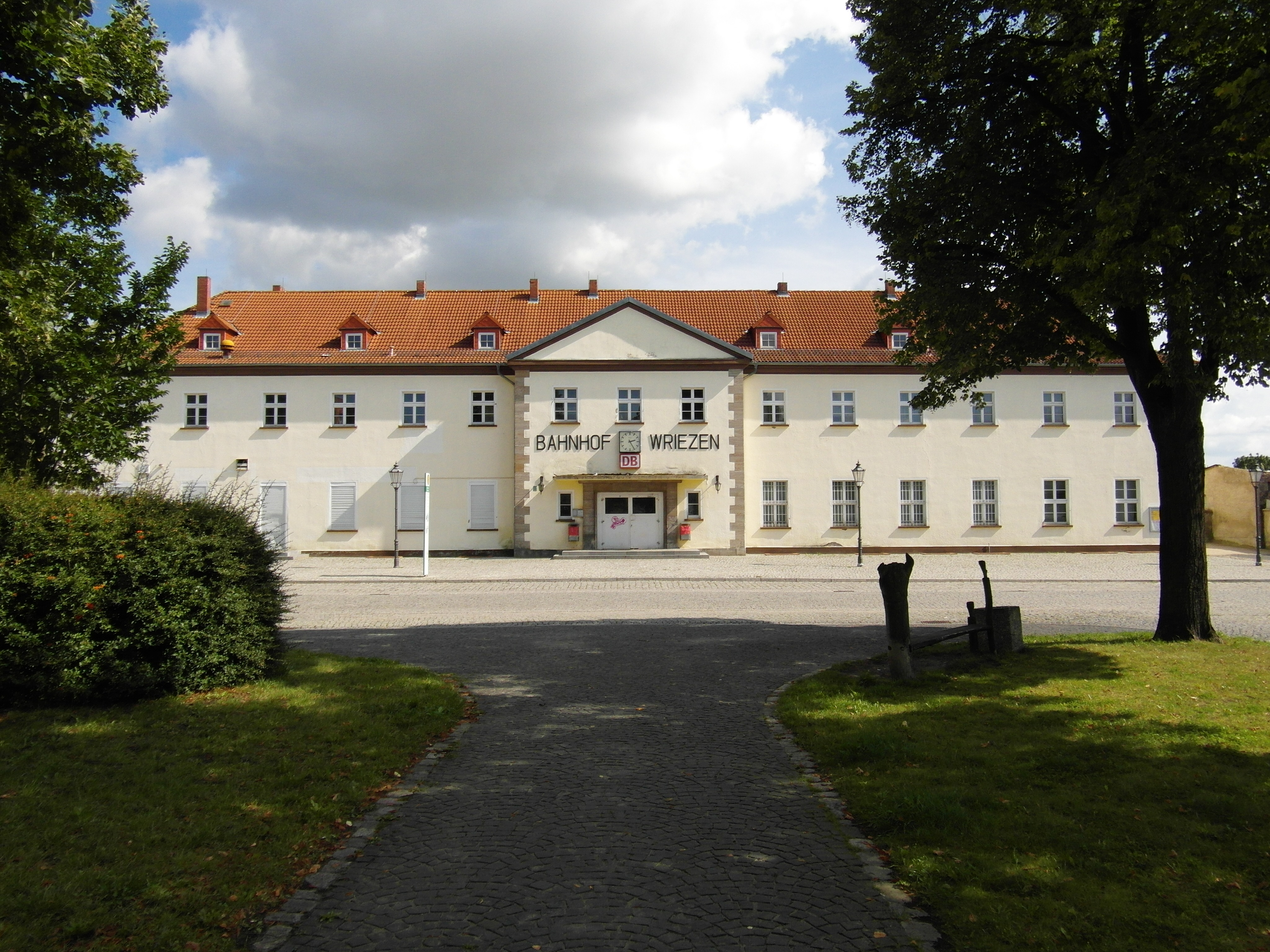 Linie OE 60